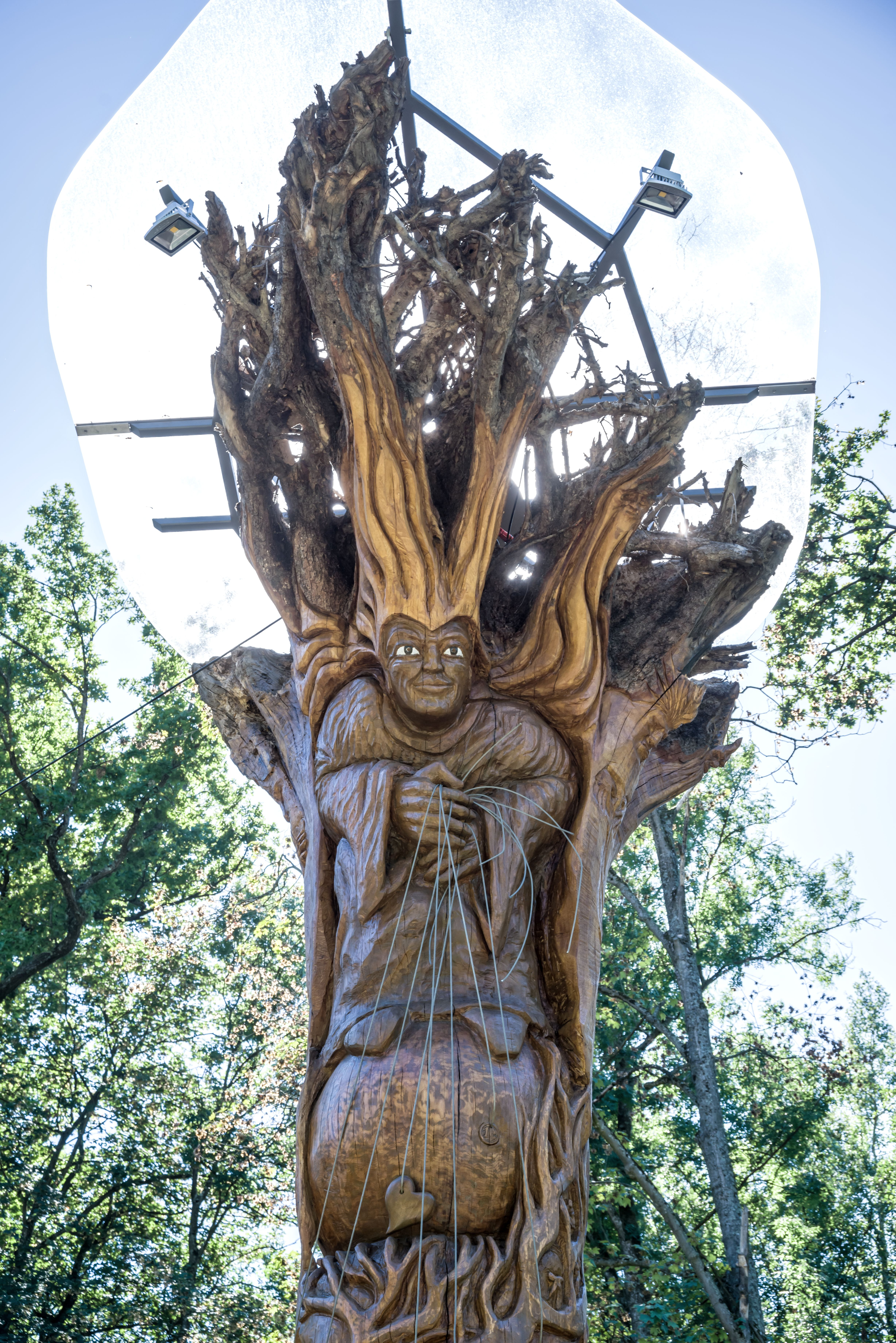 Die Holzskulptur "Weltenlenker" von THomas Rees Auf dem Hochdorfer Waldhockplatz. DIe Skulptur wurde geschnitzt aus einer ebenfalls 200 Jahre alten entwurzelten Mooswald Eiche, da die Eiche die 3 Tage nach dem Waldhock 2014 auf dem Festplatzu umgestürzt war,.nicht mehr verwertbar war. Das Kunstwerk wurde vor Ort und nicht in seiner Werkstadt geschaffen